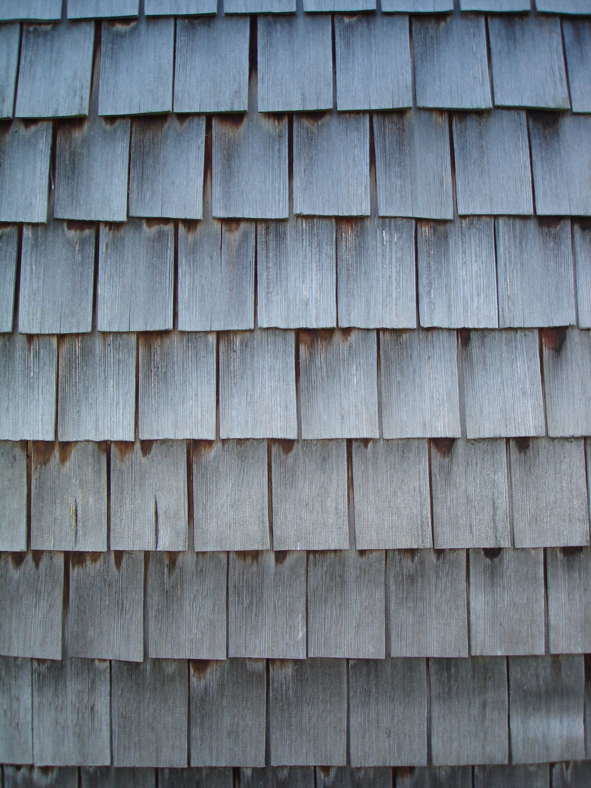 Tavaillons de la façade occidentale de l'église Saint-Maurice à Gonsans .